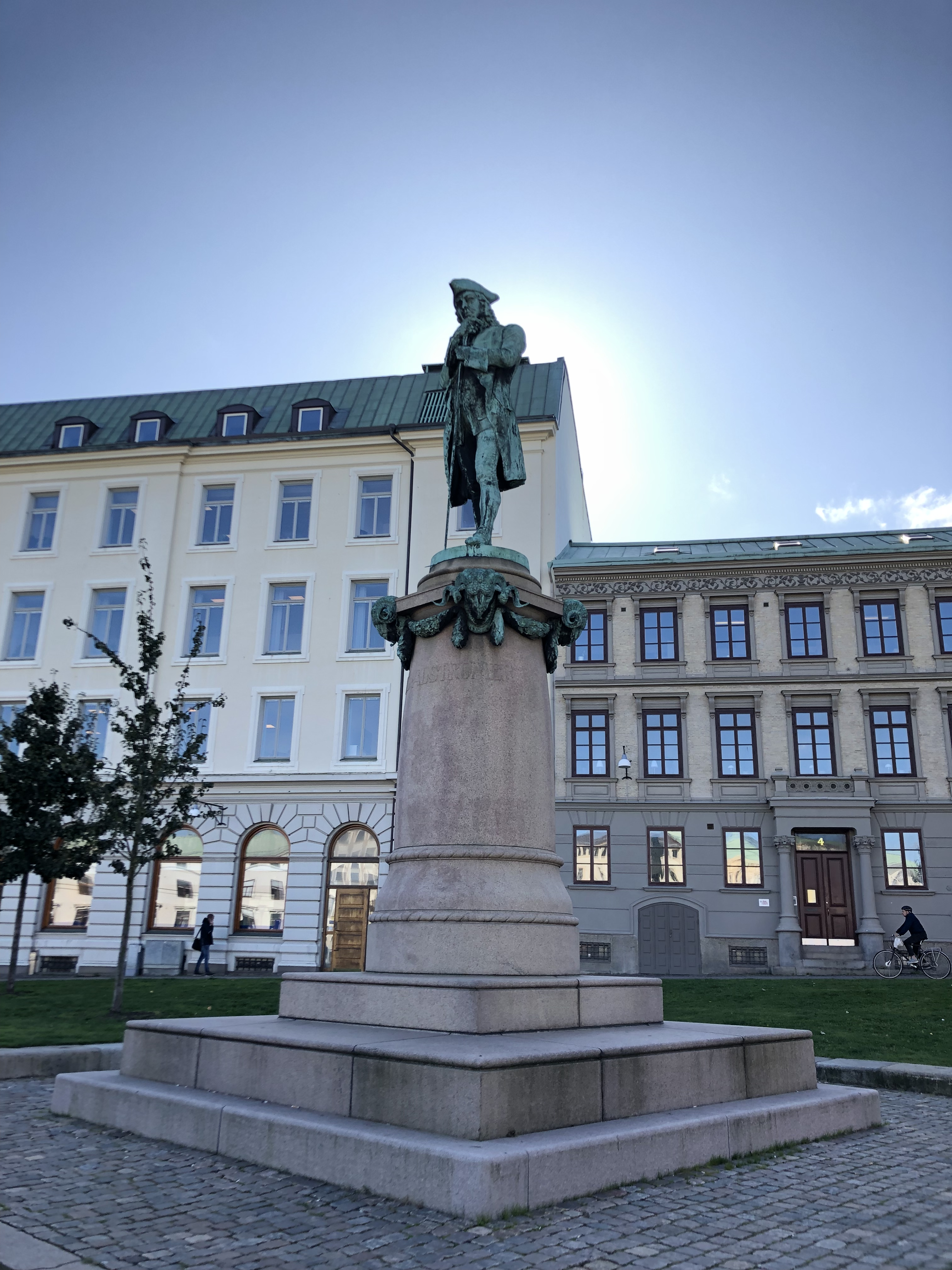 Jonas Alströmers staty i Göteborg.